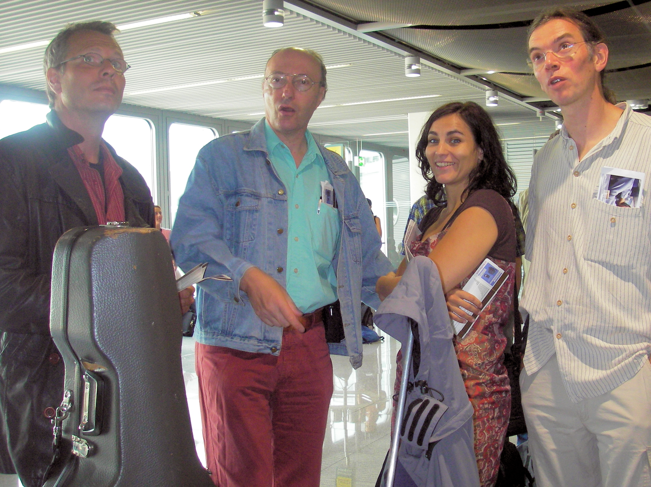 Birger Gesthuisen (2. v.l.; 1952-2015) mit den Musikern der Gruppe Ensemble DRAj (l.: Ludger Schmidt, r.: Manuela Weichenrieder + Ralf Kaupenjohann) auf dem Weg zum EBU-Festival in Kaustinen (SF) im Sommer 2006.